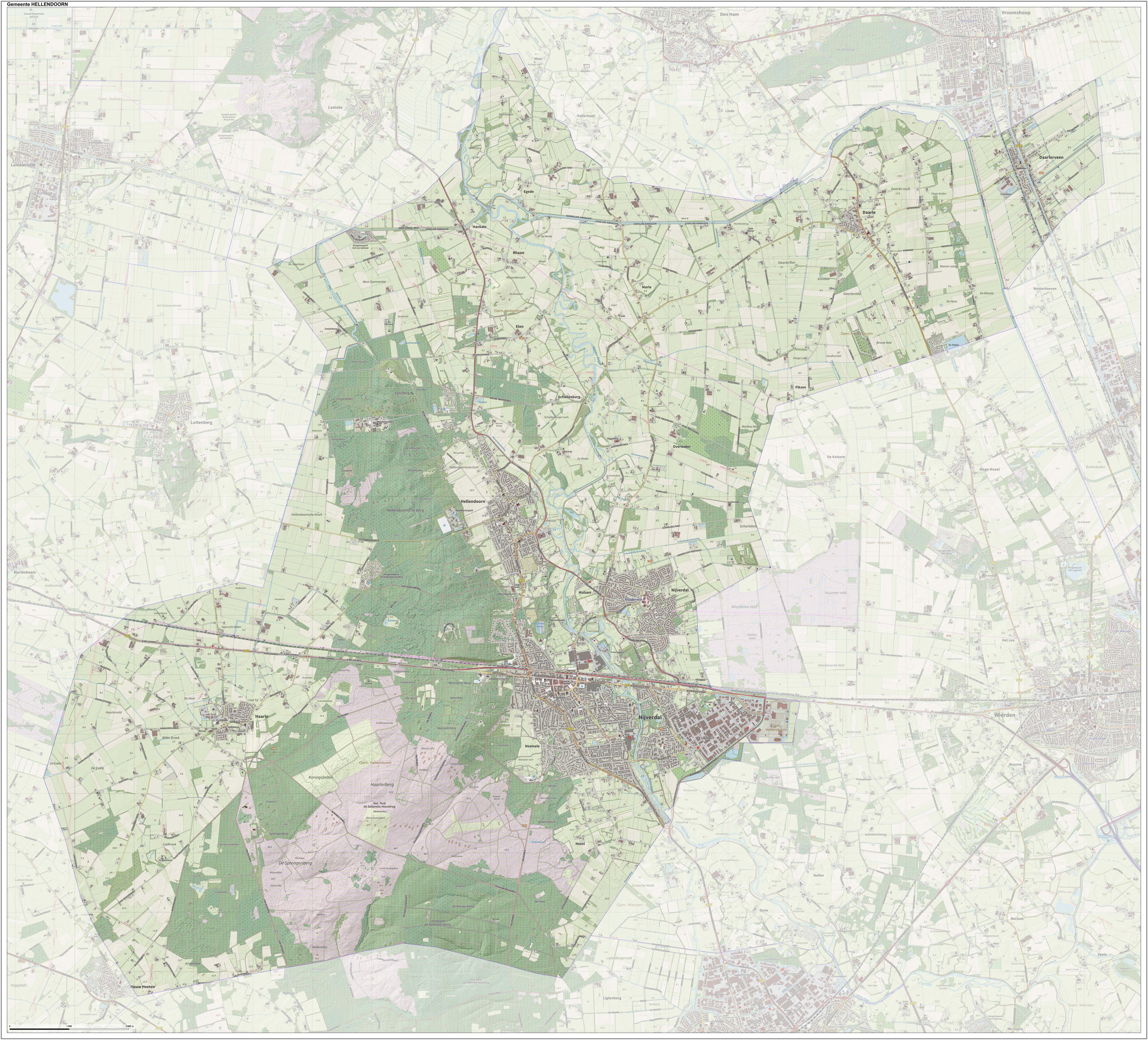 Topografische gemeentekaart. Resolutie: 400 pixels/km. Kaartbeeld samengesteld uit de open geodata van de Top10NL en Top25namen (Kadaster), Creative Commons-BY licentie. Gebouwvlakken uit open geodata BAG extract. Wegen uit de OpenStreetMap, OpenStreetMap community. Reliëfschaduw uit de Actuele Hoogtekaart AHN2. Samenstelling en kleurenschema: Jan-Willem van Aalst, met QGIS. Zie ook de Legenda.